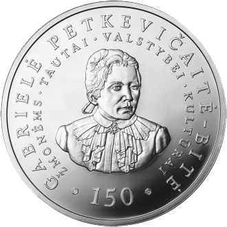 50 litas coin